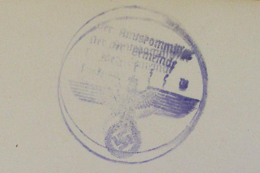 Pieczęć Urzędu niemieckiego Tkaczew z lat 1939-1945